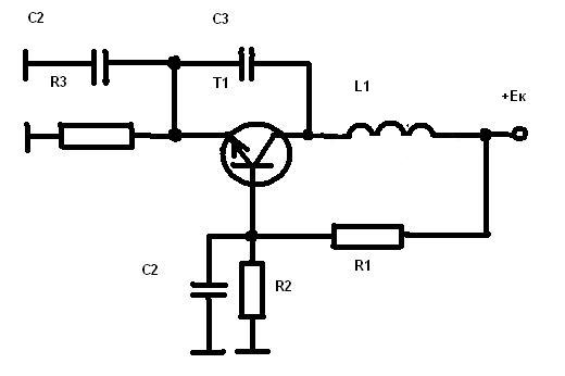 Генератор Колпитца на биполярном транзисторном каскаде с общей базой.